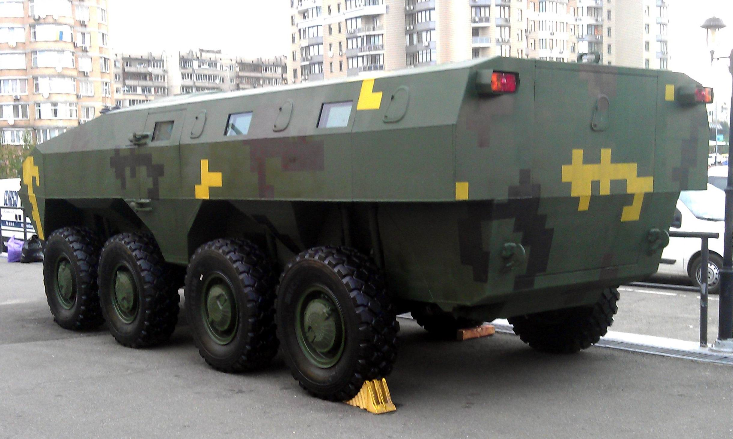 Бронетранспортер "Варан" в экспозиции НПК "Техимпекс". Выставка "Зброя та безпека", Киев, сентябрь 2015 г.